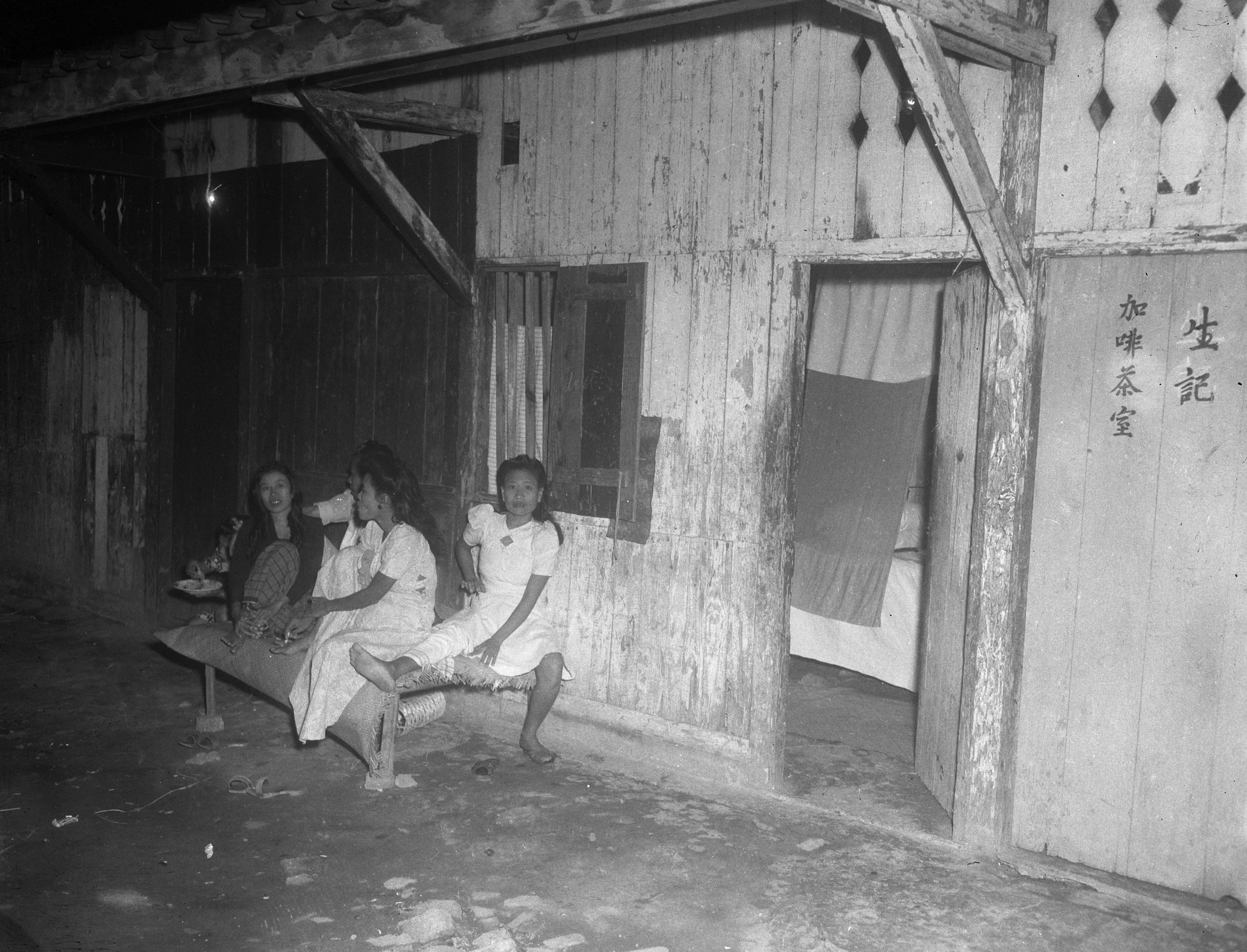 [Vrouwen (prositiuées?),zitten op een bankje voor een houten barak. Batavia (Jakarta), Indonesia. Rechts Chinese tekens op planken] Fotocollectie Dienst voor Legercontacten Indonesië [DLC] Reportage medisch rapport dokter Nanning [prostitutie?] Datum 22 juni 1948